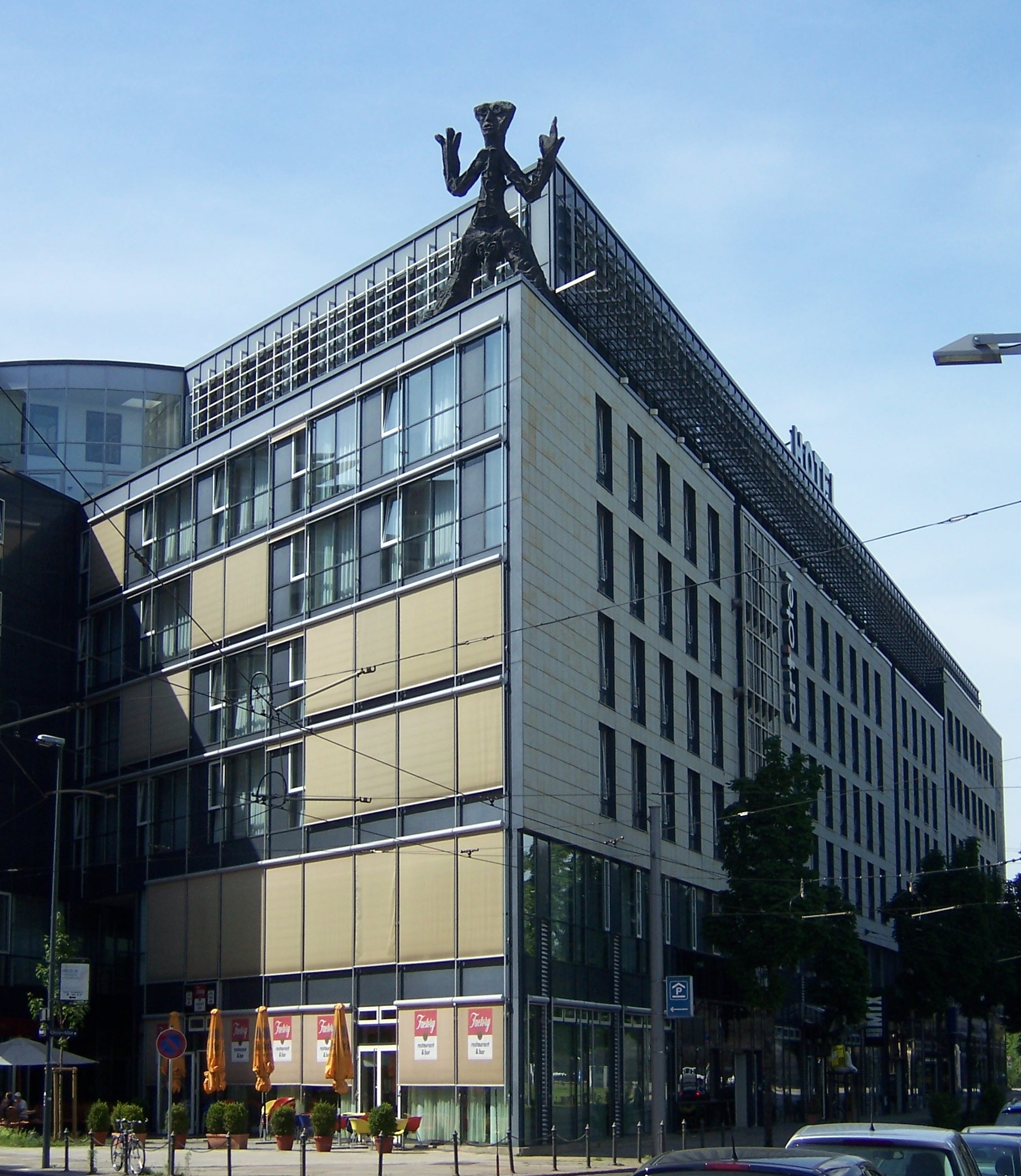 Das Art'otel in Dresden mit einer Plastik Pencks auf dem Dach.